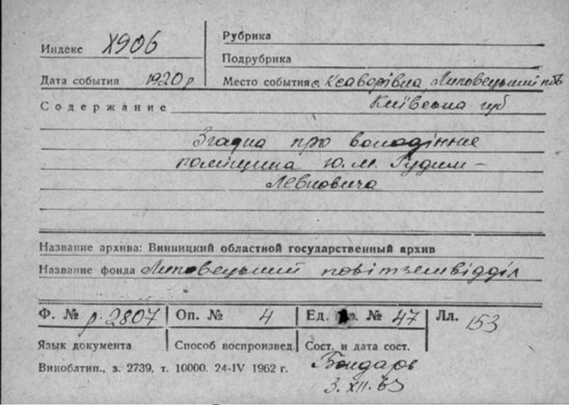 документ, що підтверджує події. Ксаверівка, Липовецький повіт Київської губернії